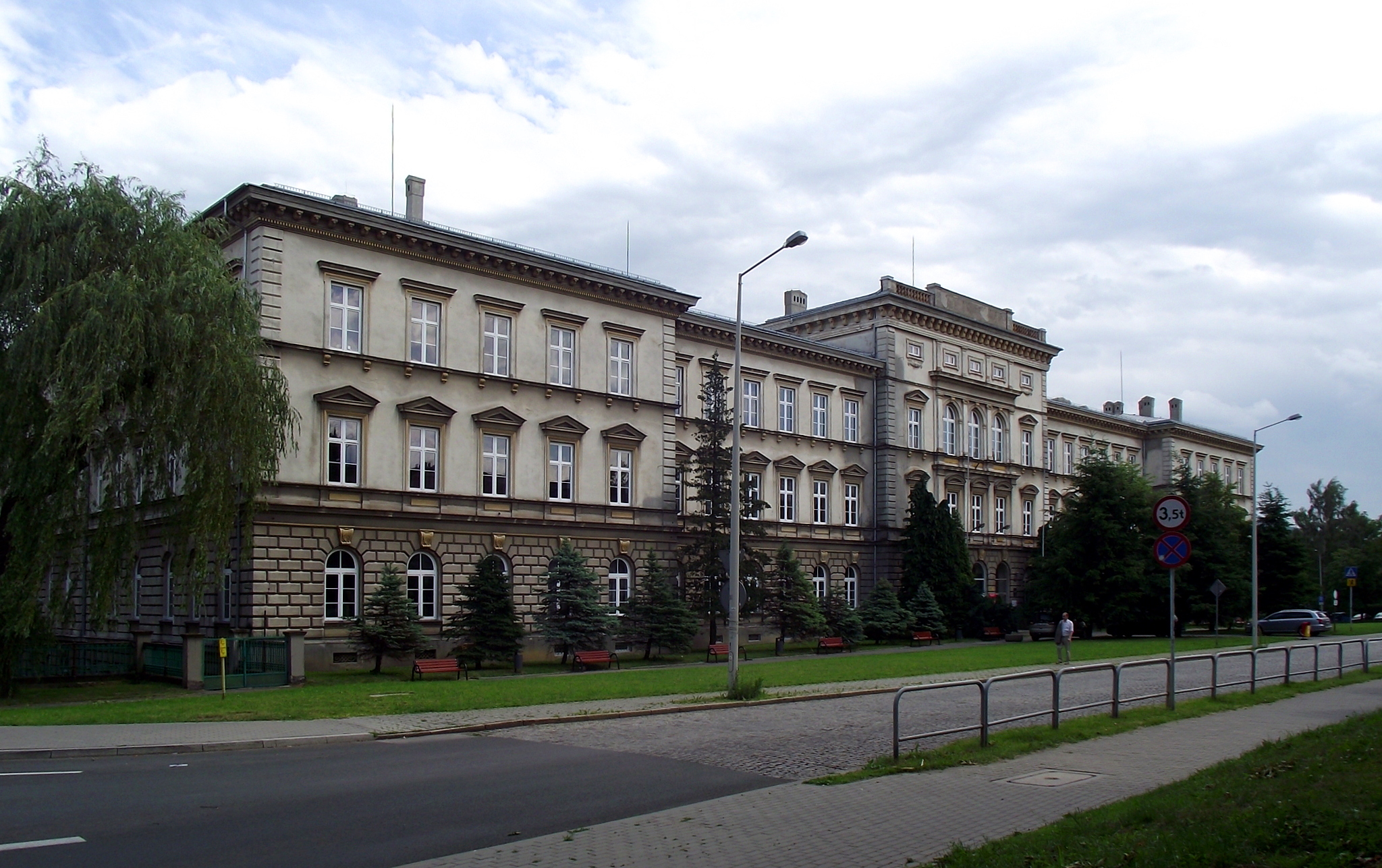 Gmach szkół średnich przy ul. Słowackiego w Bielsku-Białej